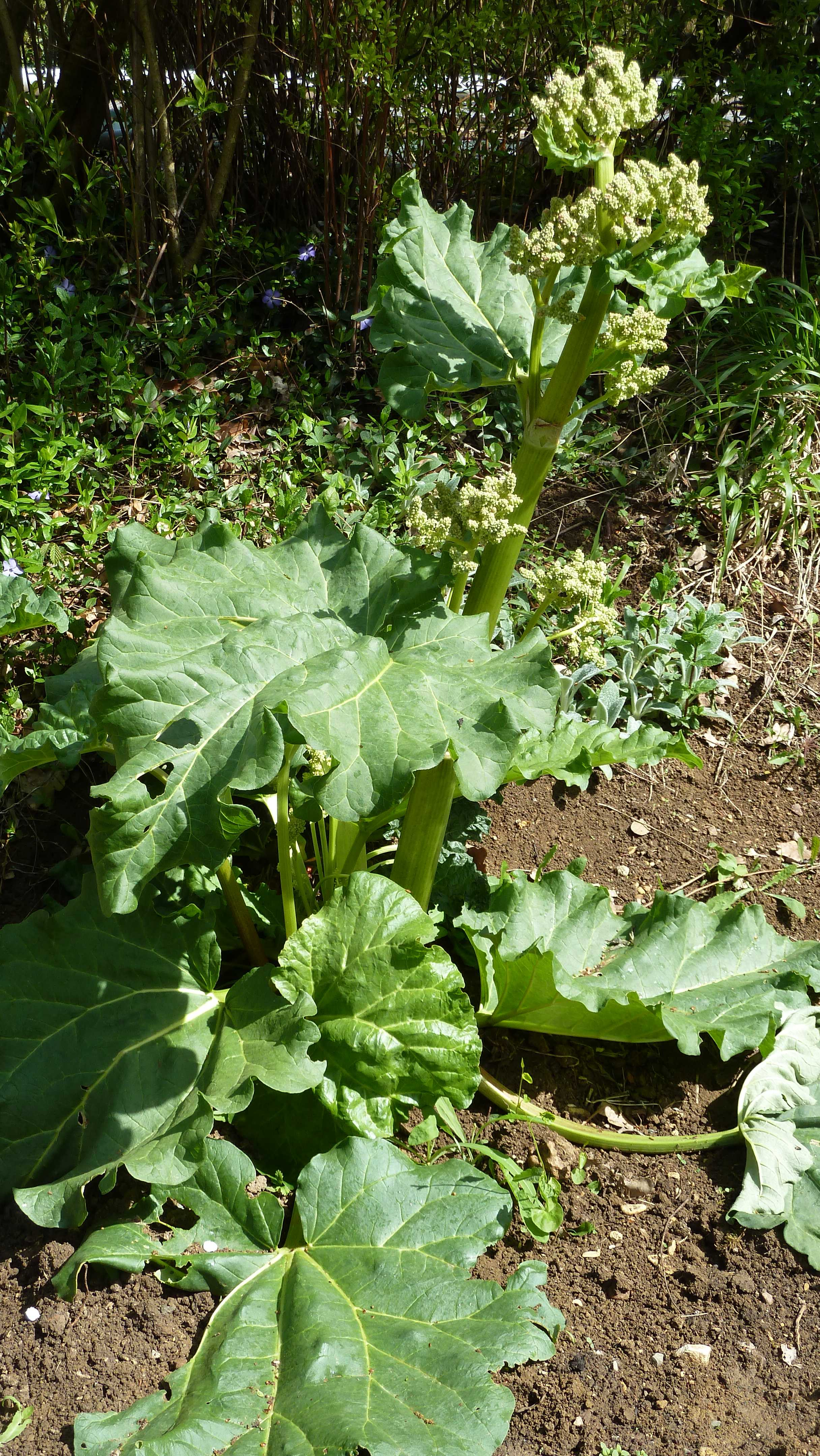 Plant de Rheum rhaponticum